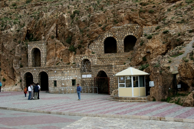 Katalekhor cave in Zanjan